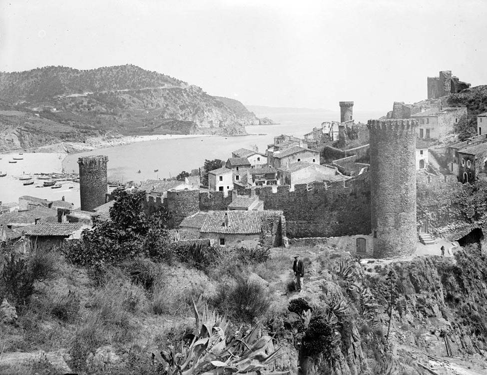 Vista de Tossa de Mar amb la platja al fons. Enric Ribas i Virgili (Entre 1920 i 1930)